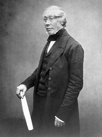 Джордж А́рнотт А́рнотт, или Уо́кер-А́рнотт (англ. George Arnott Walker-Arnott, 1799—1868) — шотландский ботаник